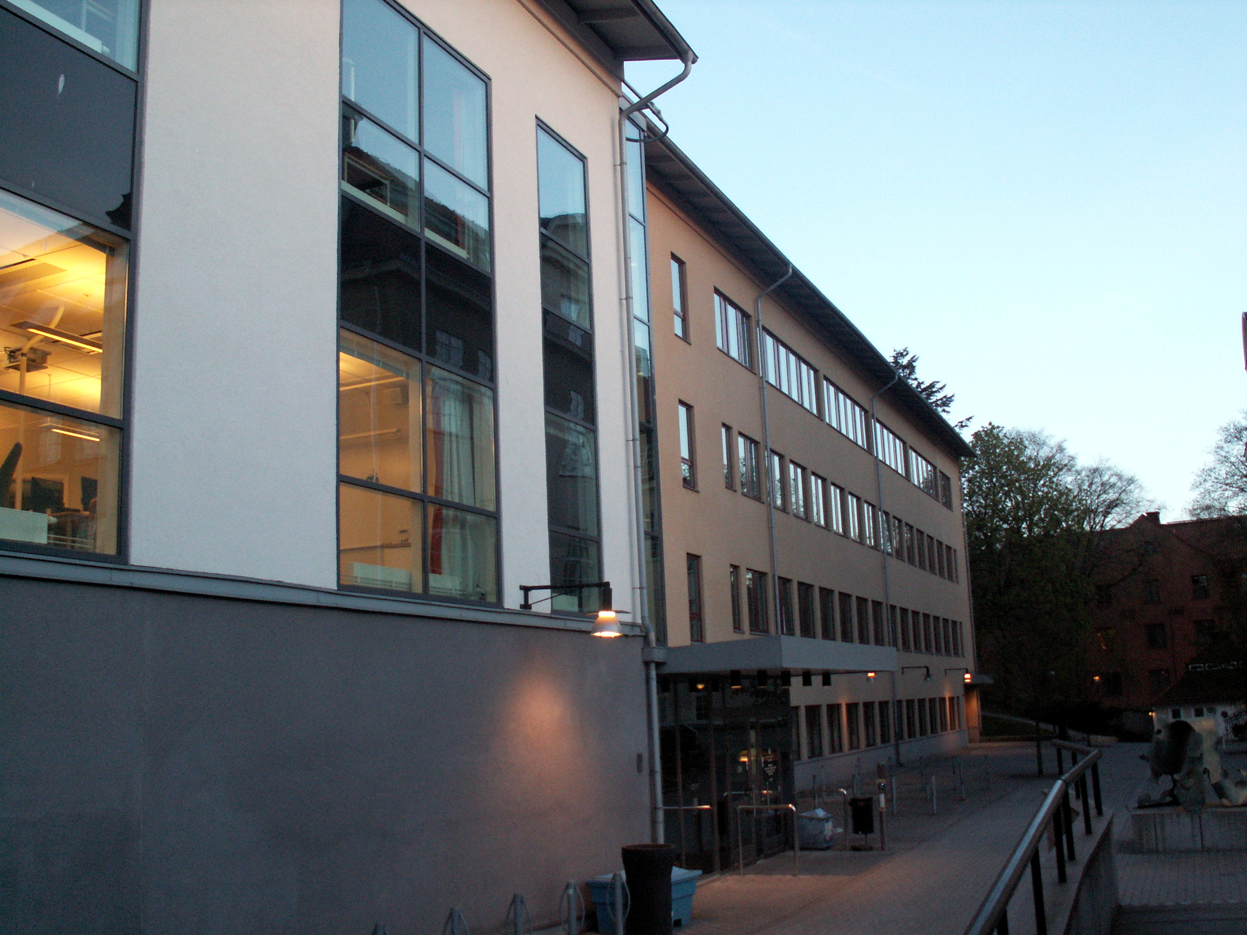 Institutionen för journalistik, medier och kommunikation (Campus Linné på Göteborgs universitet).